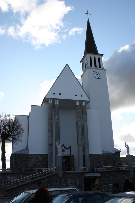 Gargždų Šv. arkangelo Mykolo bažnyčia